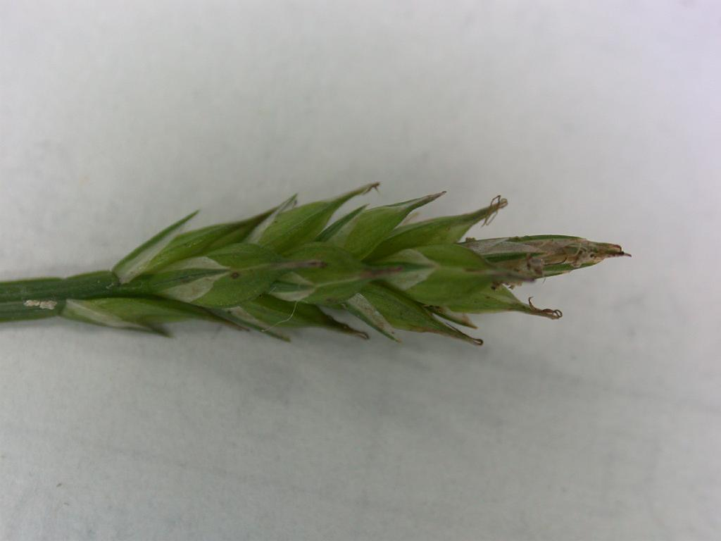 Carex rhizopoda (Cyperaceae) シラコスゲ ２００４年５月８日和歌山県田辺市